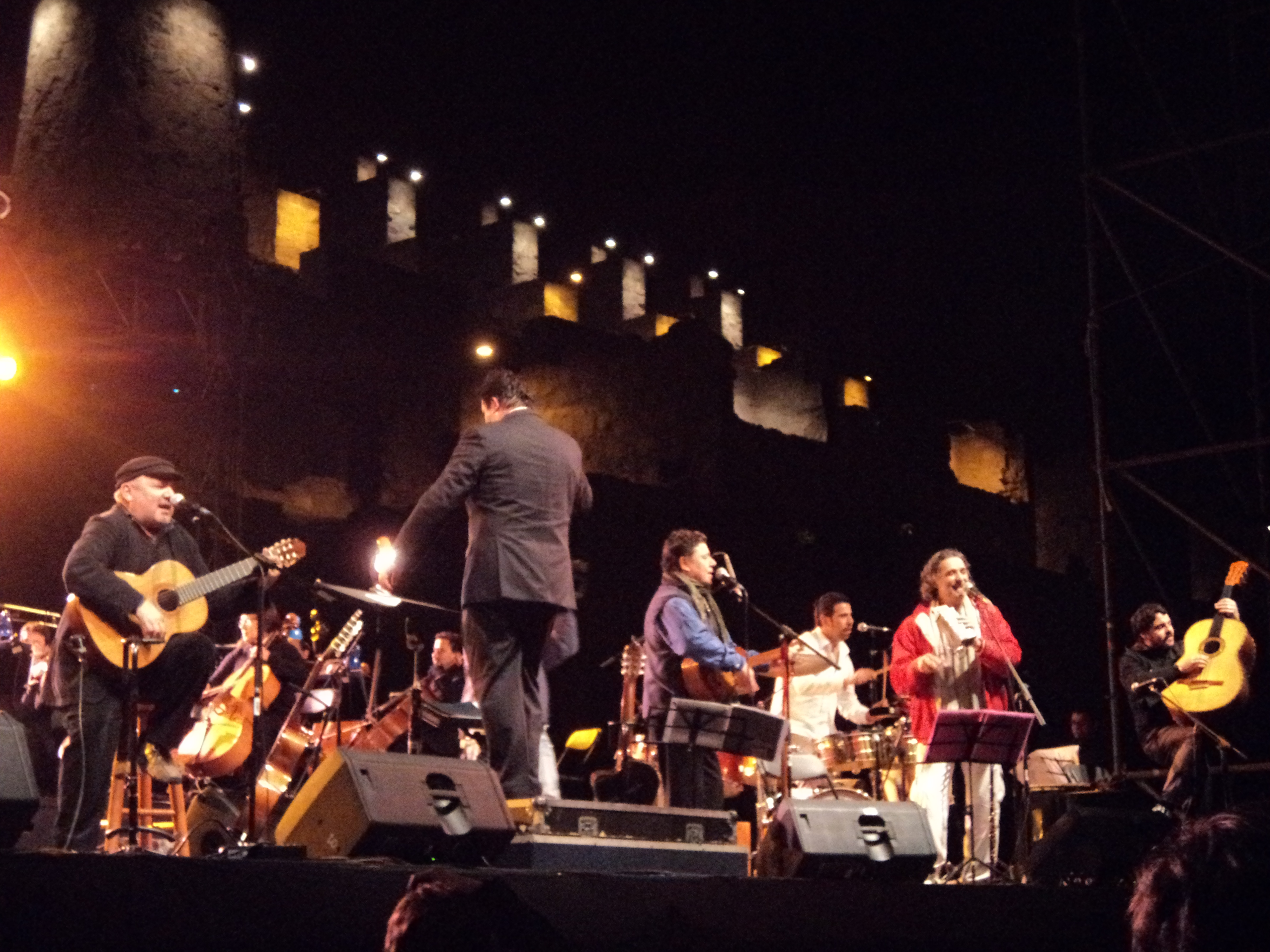 Concierto musical en las Ruinas de Huanchaca (Antofagasta,Chile), por la Orquesta Sinfónica de Antofagasta, además de los grupos musicales "Inti-Illimani" y "Los Bipoalres".